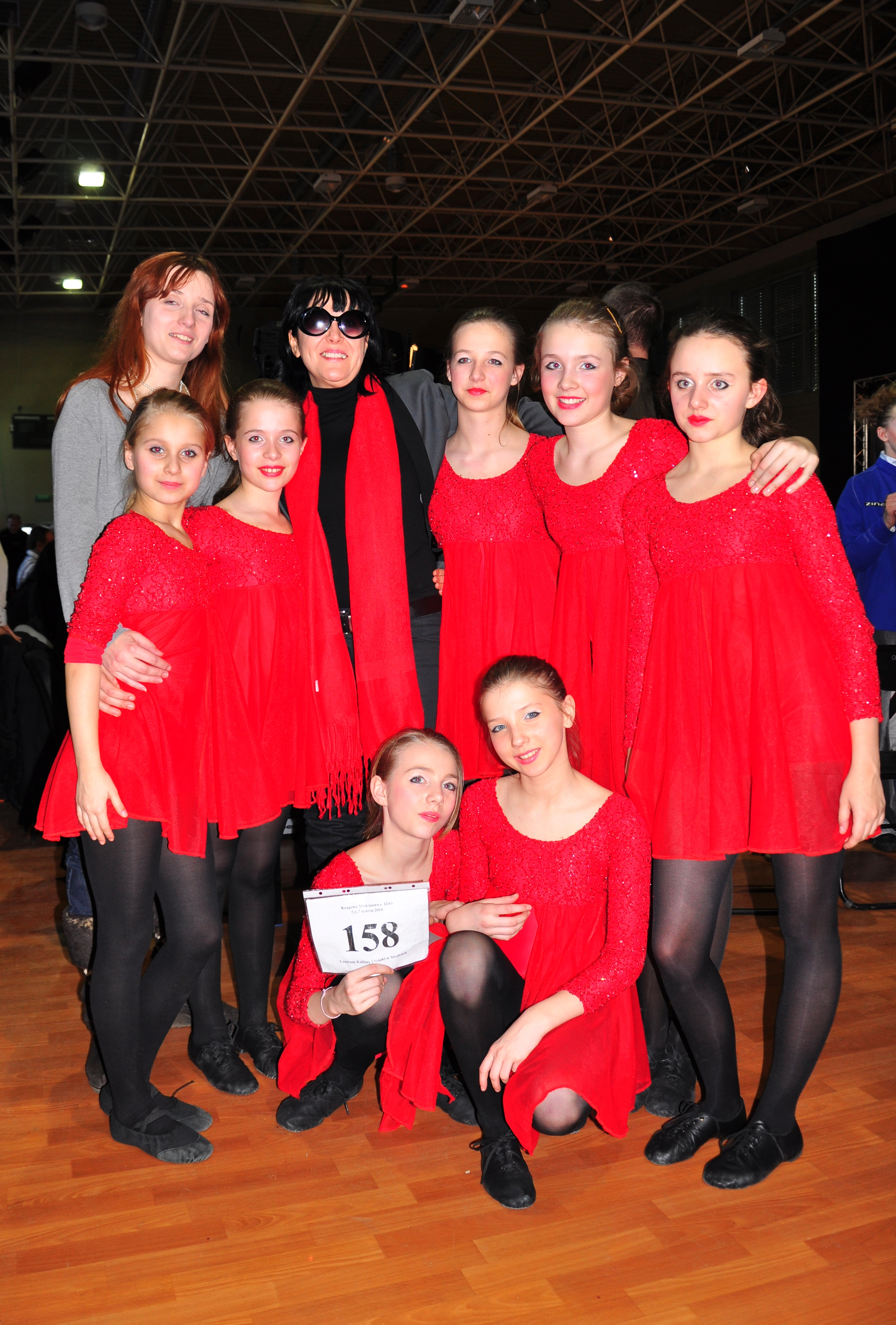 Eine CaroDance-Formation (Junioren) bei den nationalen Modern Dance-Meisterschaften im Frühjahr 2010 in Siedlce. Mit Trainerin Joanna Piotrowicz und Choreographin Iwona Orzełowska